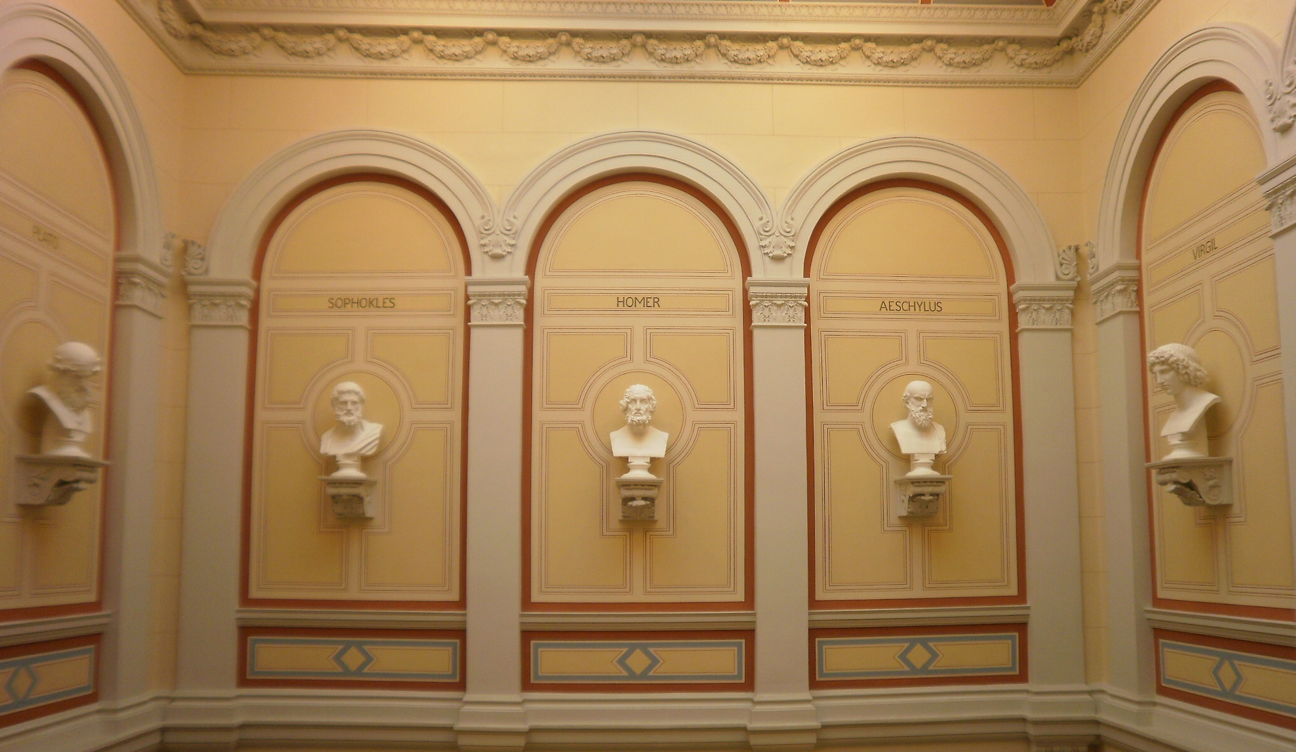 Büsten antiker Gelehrter im Treppenaufgang des Hauptgebäudes der Universität Rostock